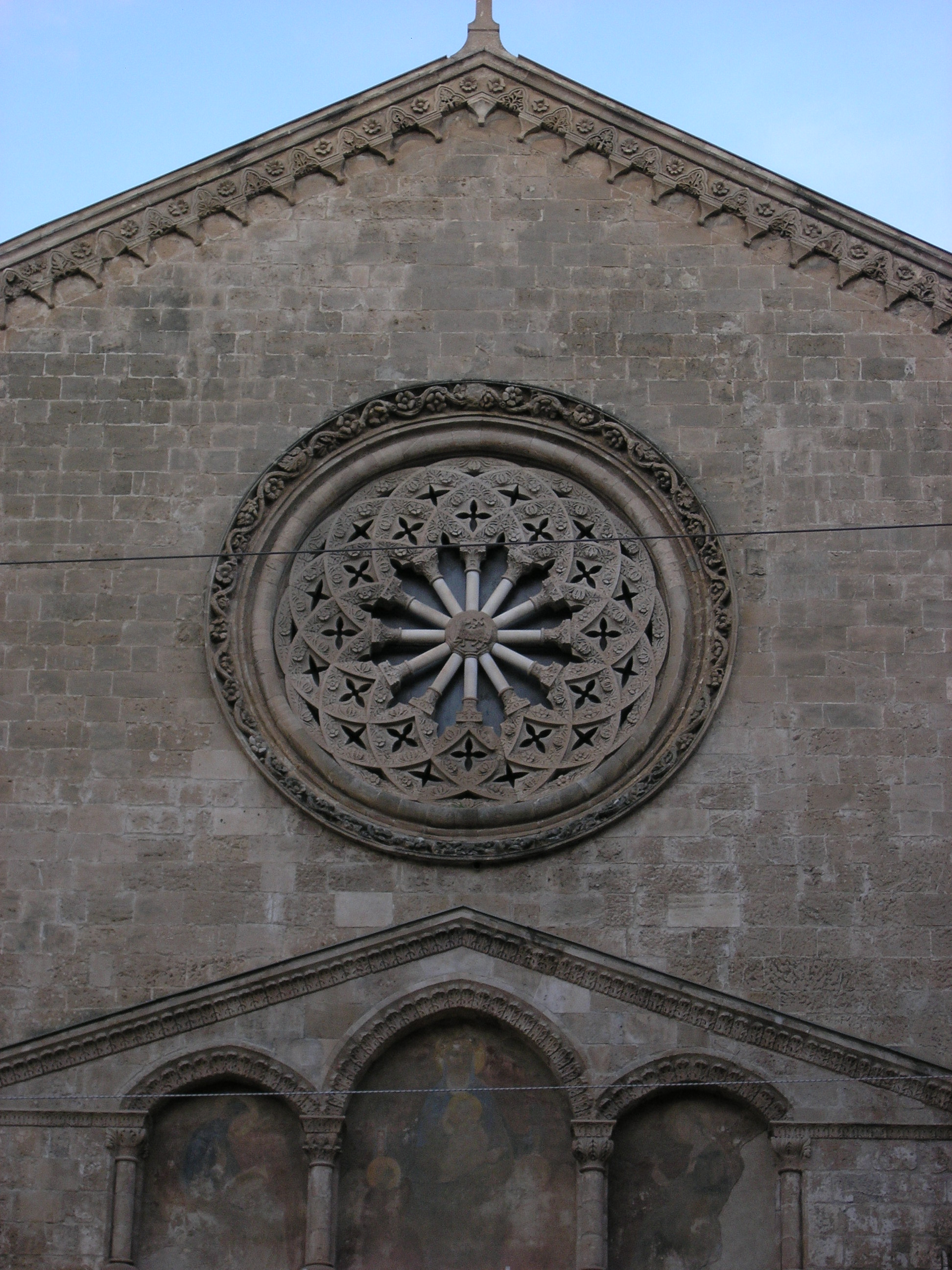 Sicilianu: Crèsia di San Franciscu d'Assisi